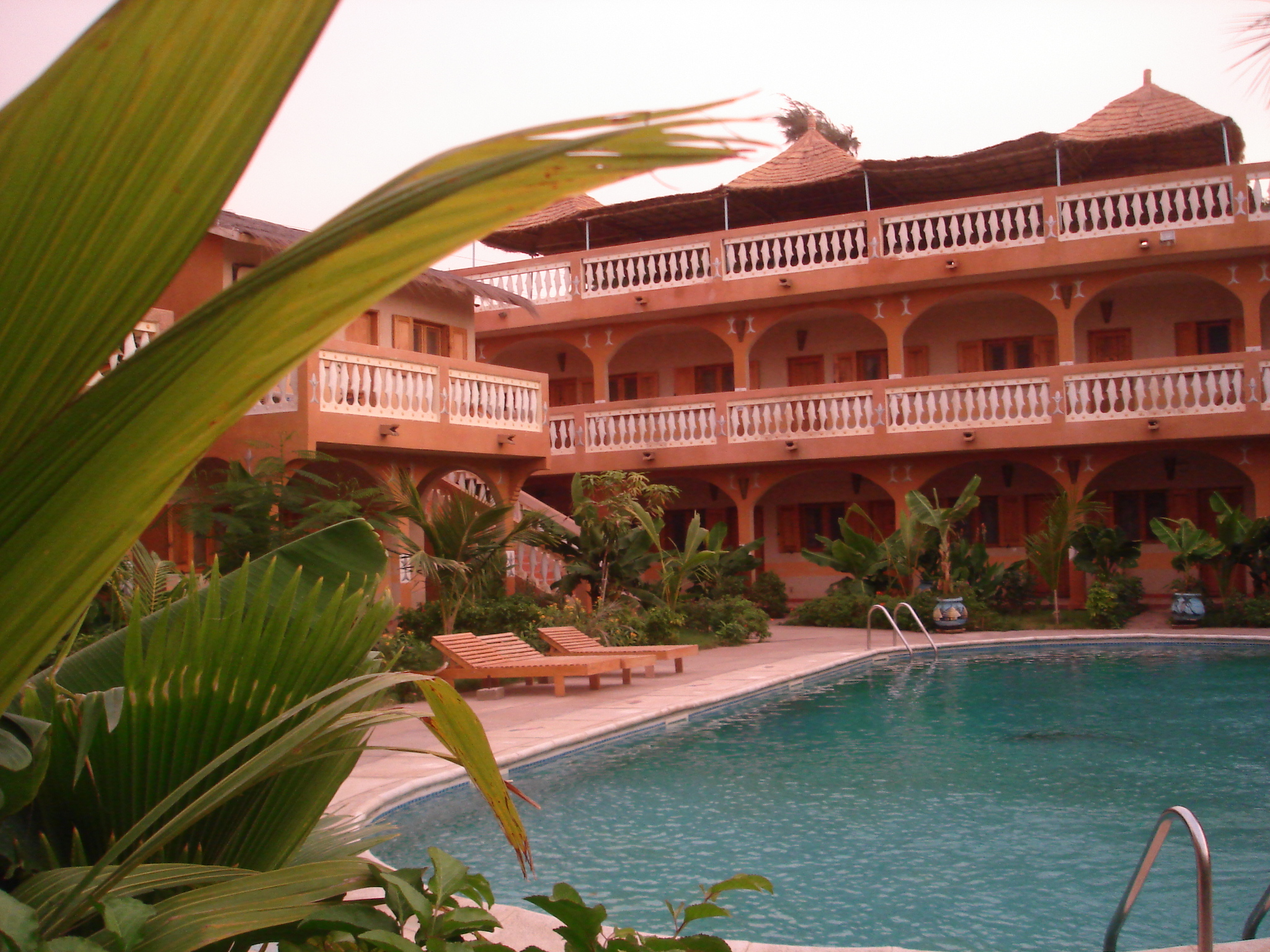 Hotel Kairaba de Saly portudal et sa piscine. Auteur : Jean-Claude Perez